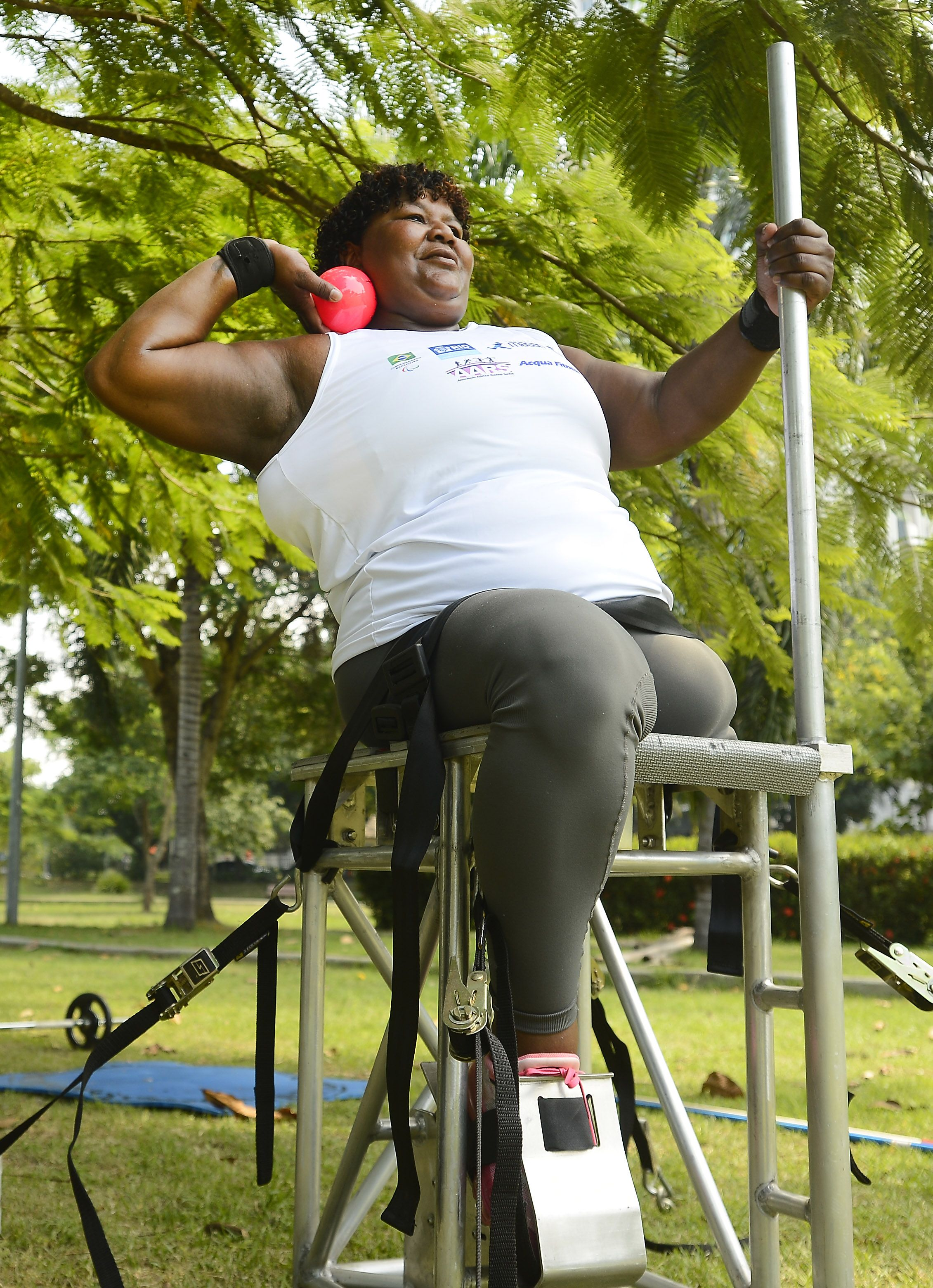 Rio de Janeiro - A paratleta Rosinha Santos treina no Recreio dos Bandeirantes, zona oeste da cidade (Tânia Rêgo/Agência Brasil)